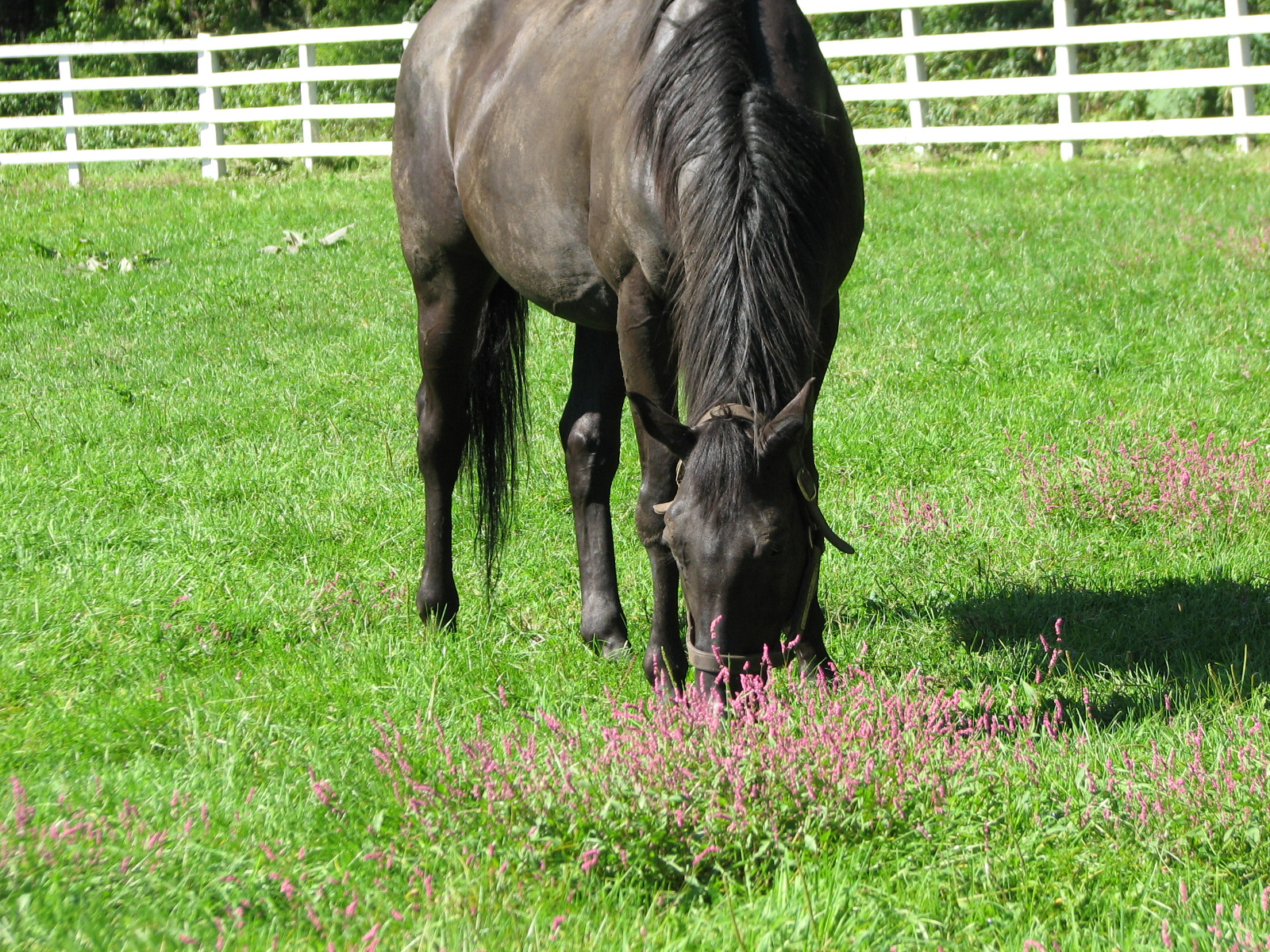 ジェニュイン（レックススダットにて撮影）